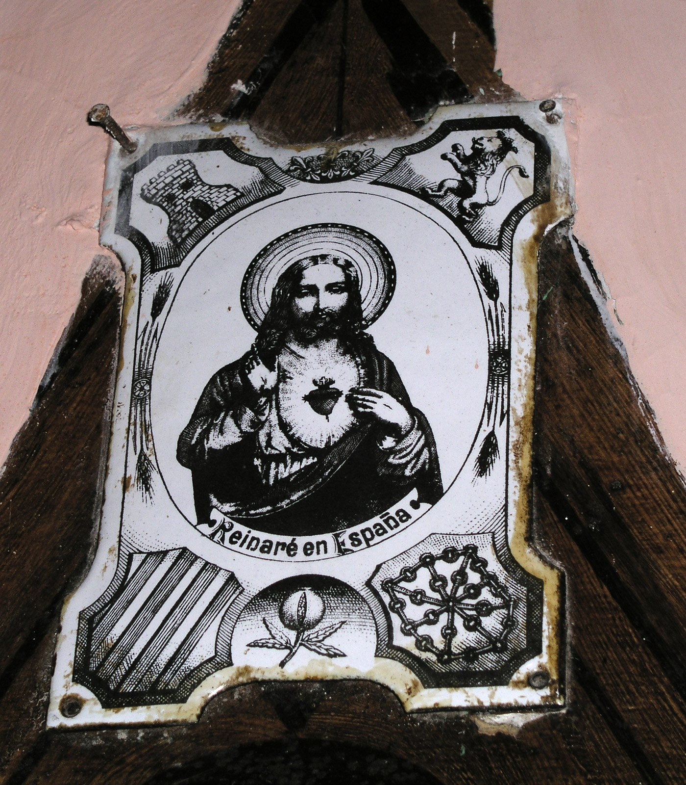 Imagen de Cristo Rey, como la que se ponía en las puertas de las casas católicas a principios del siglo XX.